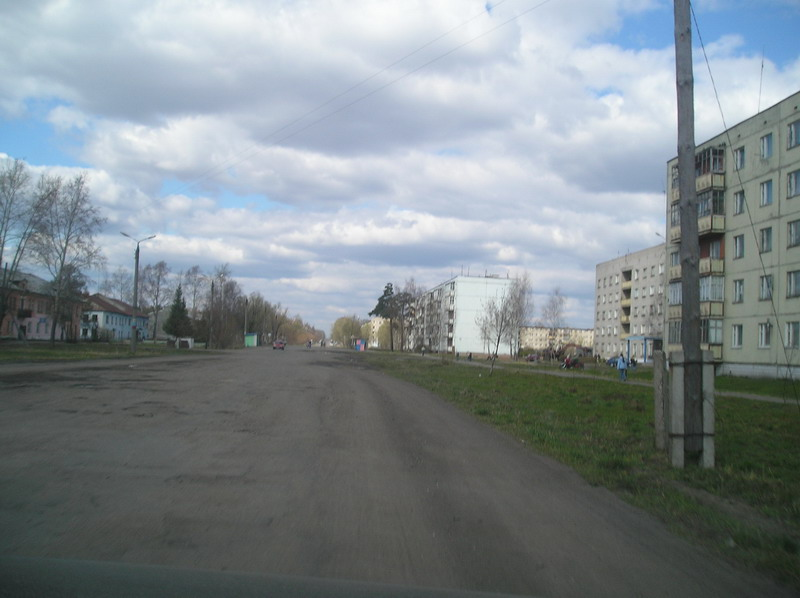 Улица Мира в Заволжске